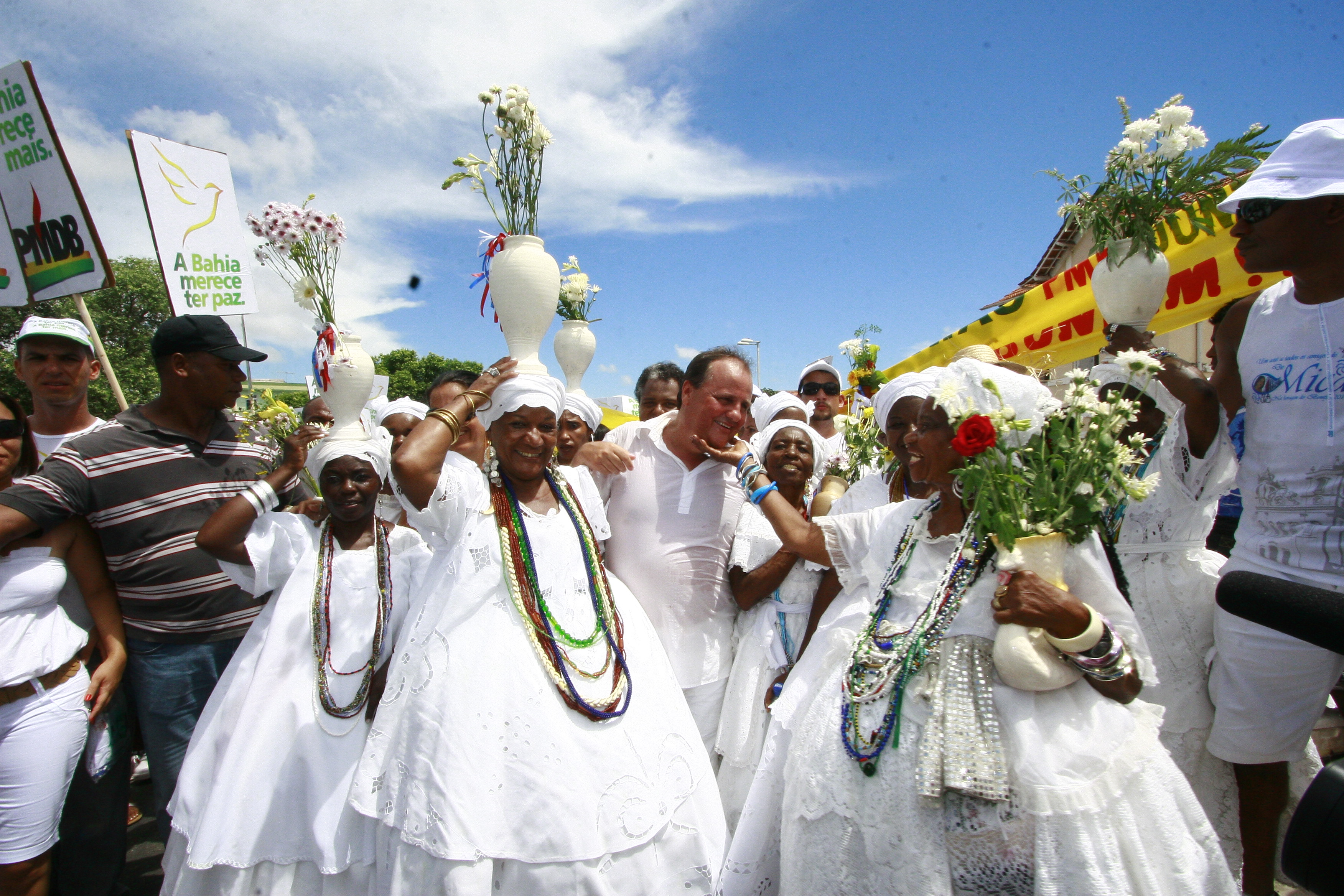 Geddel em caminhada durante festa do Bonfim, em 2010